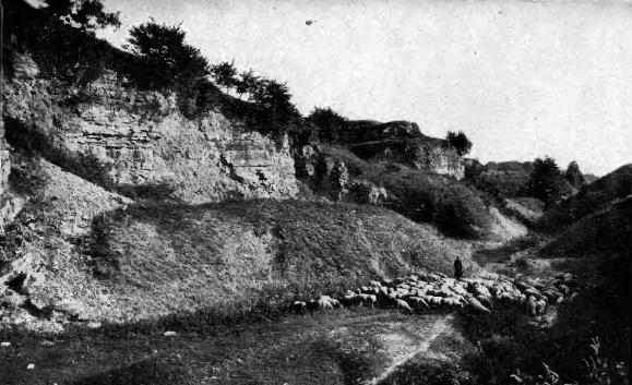 Das Kuhtal in Sankt Annaberg